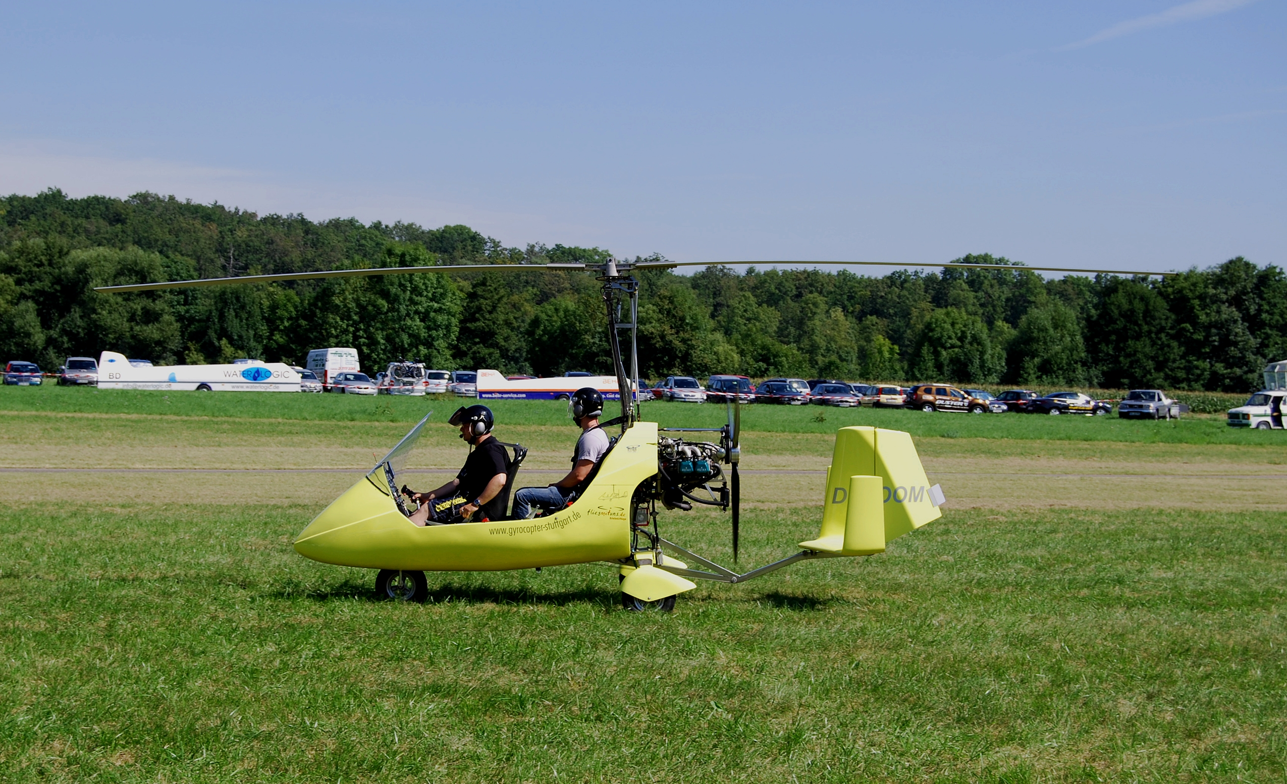 Ein AutoGyro MT-03 Gyrocopter (D-MOOM) beim Flugfest in Löchgau, August 2010